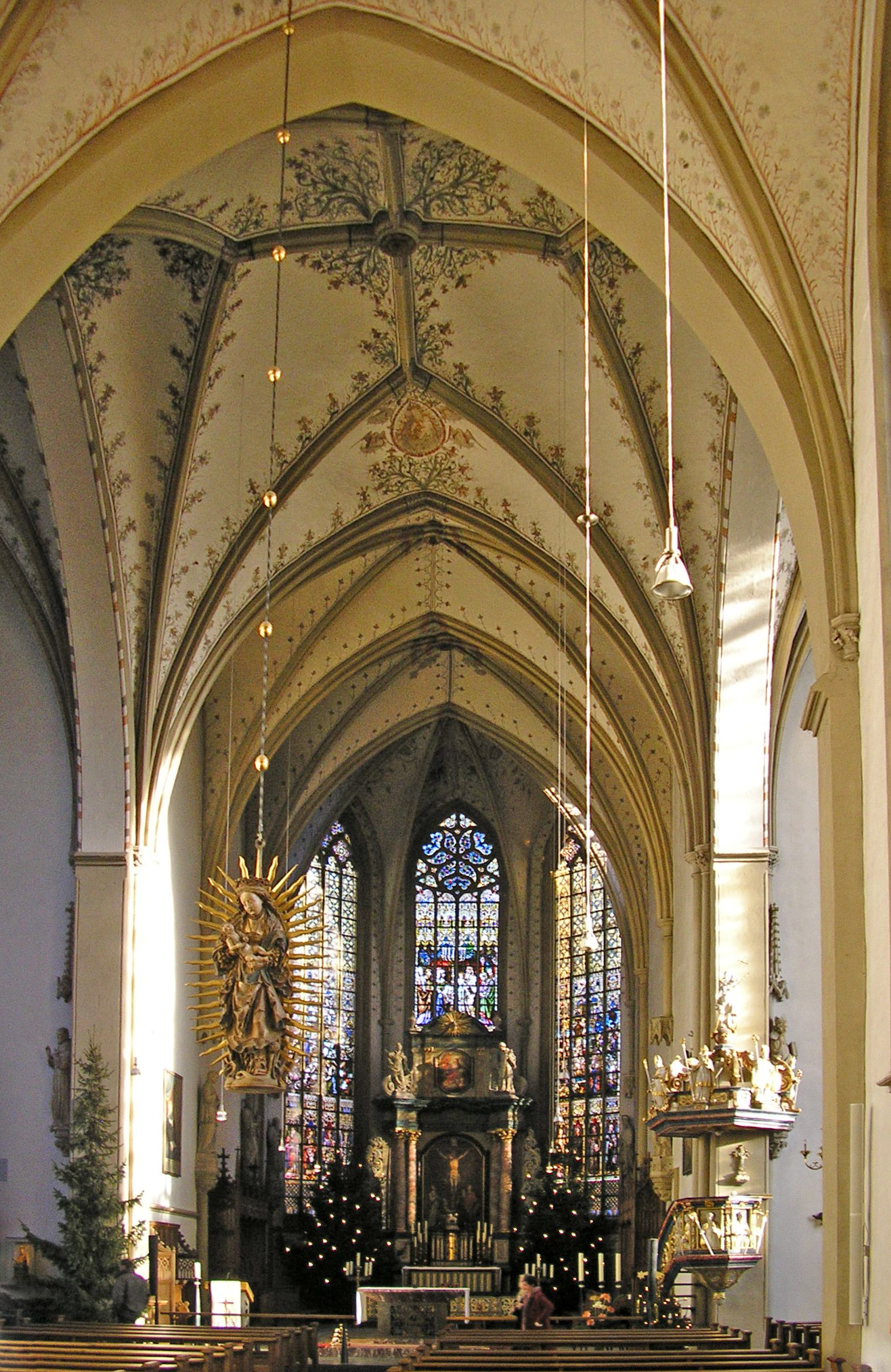 Abtei Liesborn